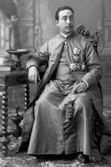 Erzbischof Giovanni Battista Guidi (1852-1904), vatikanischer Diplomat